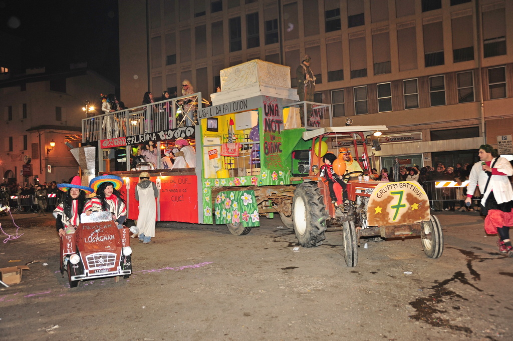 zobia 2012